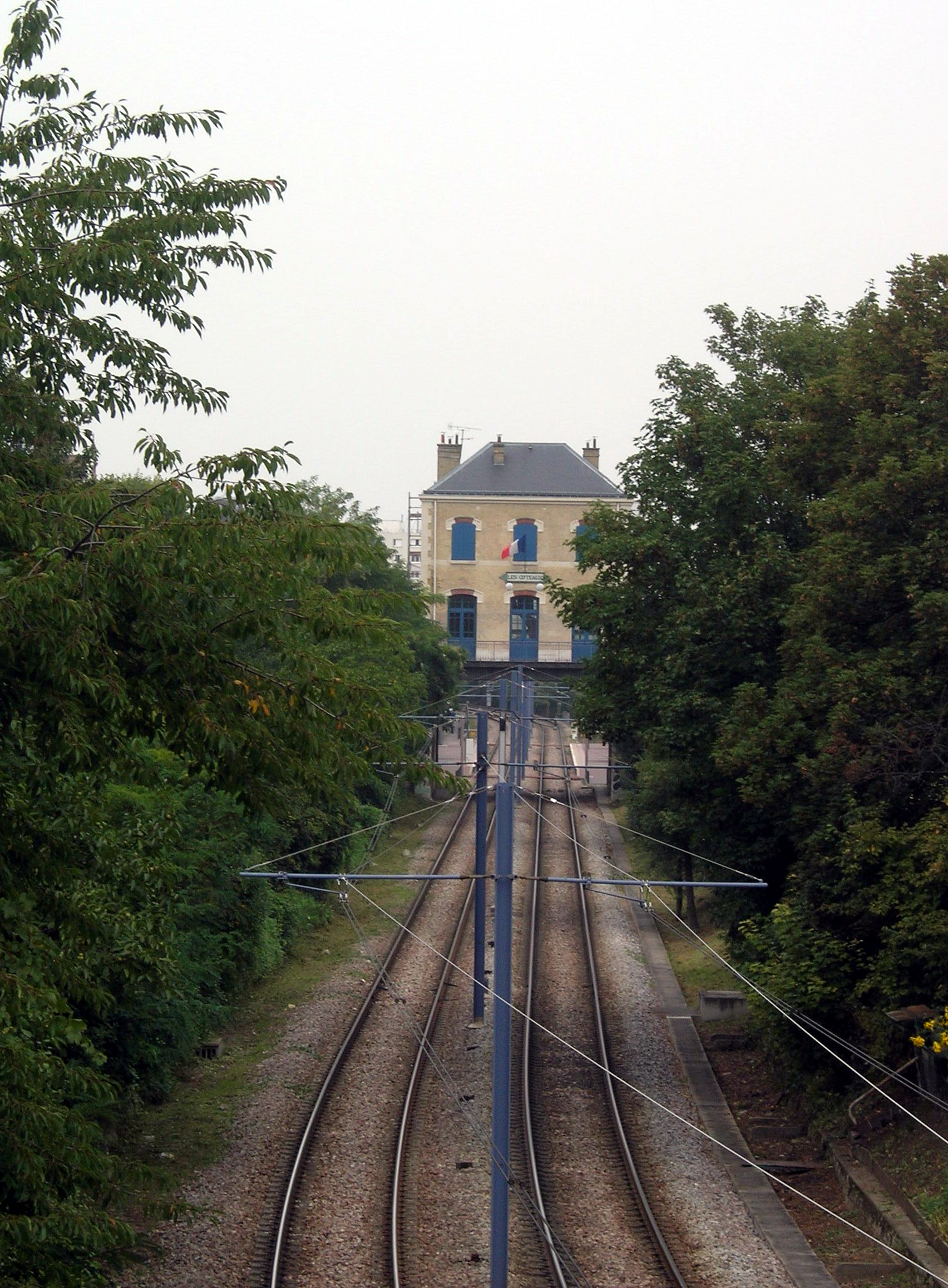 Gare des Coteaux du tramway T2 à Saint-Cloud